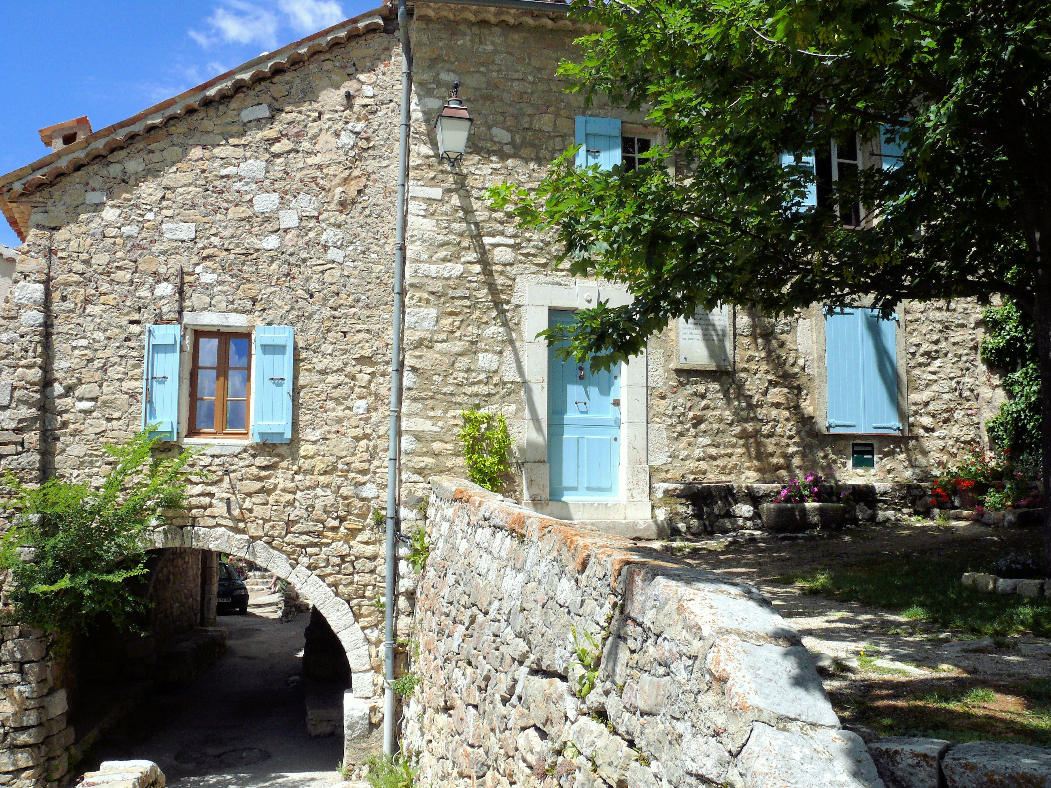 Bargème - Mairie